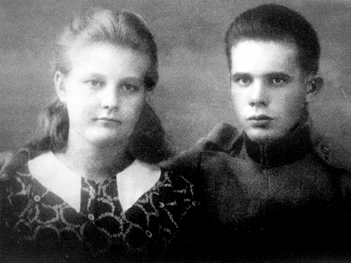 Srpskohrvatski / српскохрватски: Mladi Stjepan Filipović (desno).